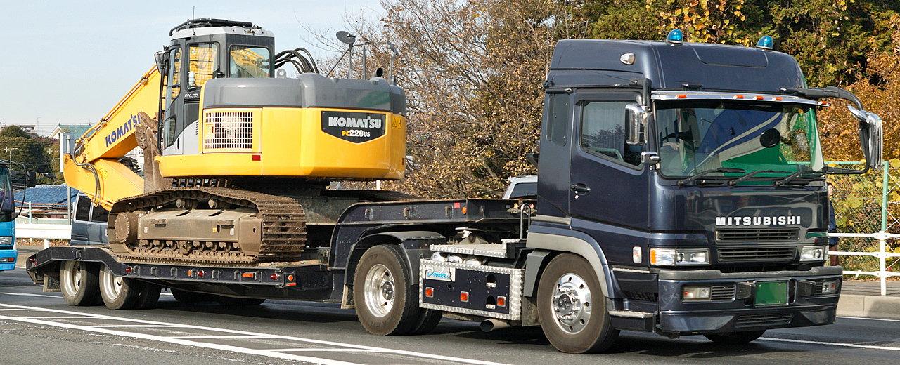 Car transporter